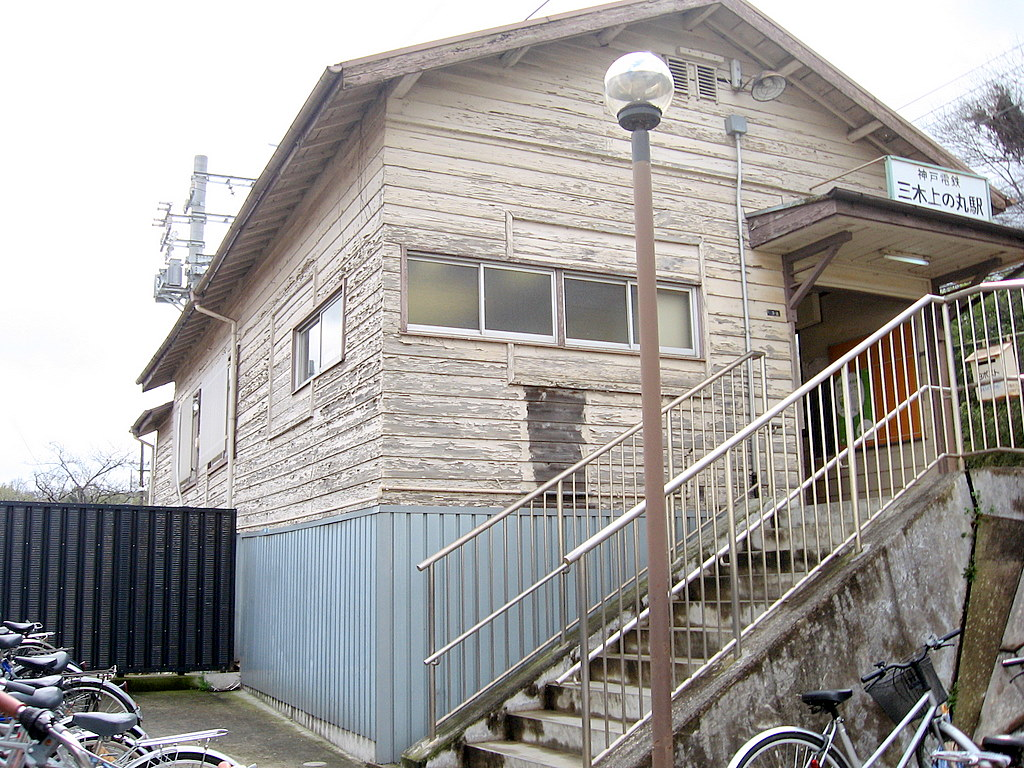 三木上の丸駅舎(2006.03.01に投稿者が撮影)